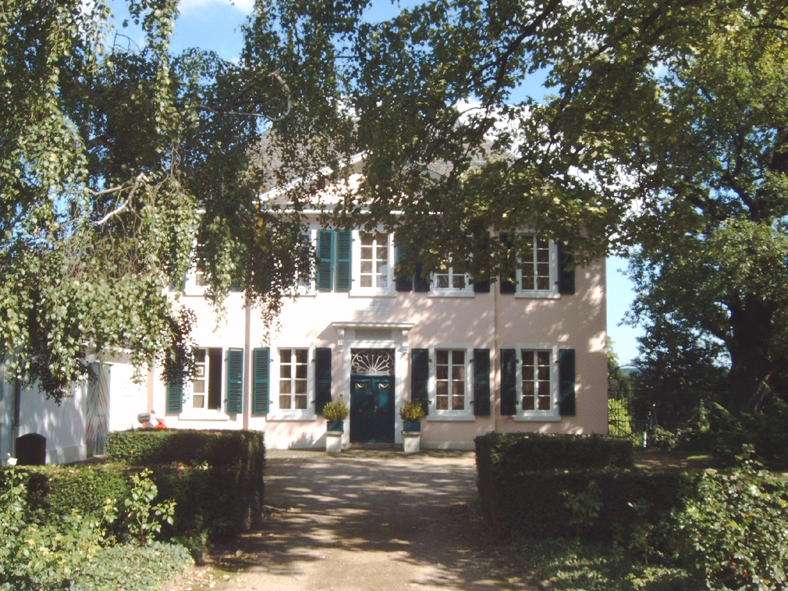 Ernst-Moritz-Arndt-Haus in Bonn, Ortsteil Südstadt